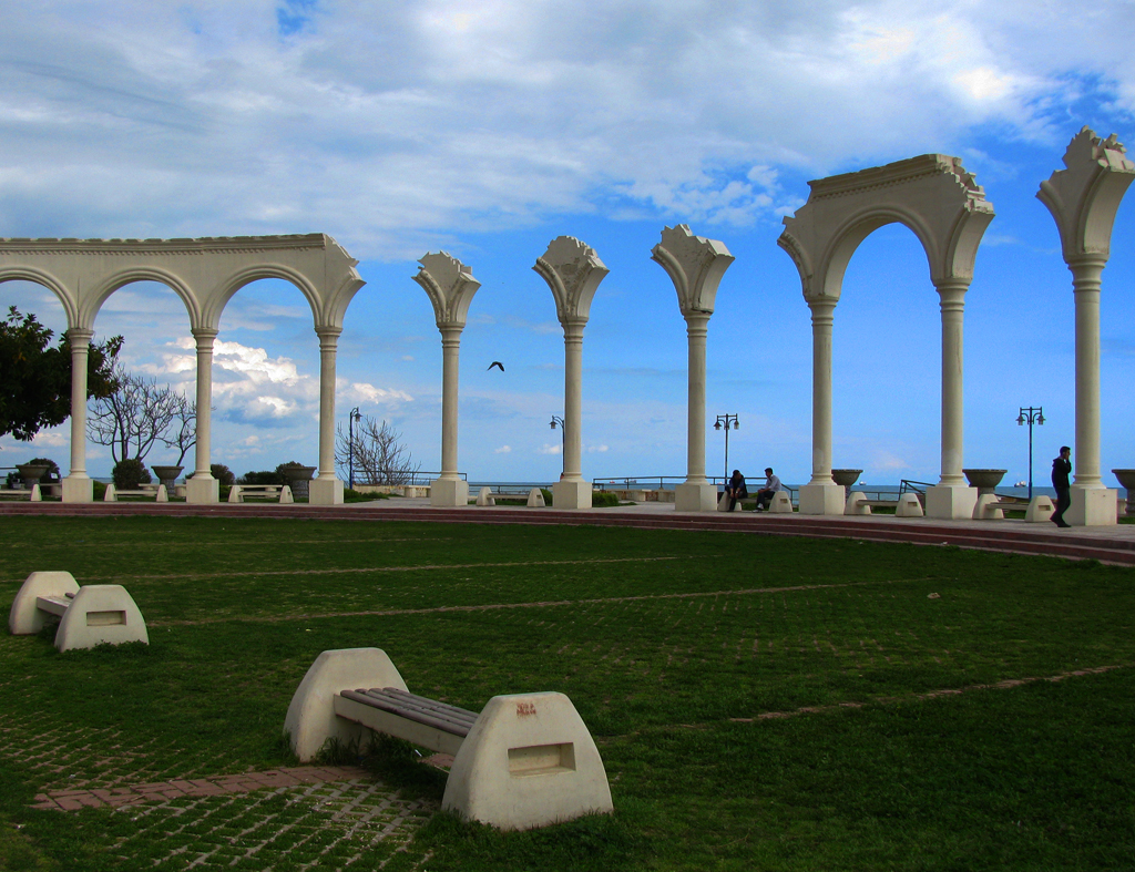 Mersin, Mesudiye, Akdeniz/Mersin Province, Turkey